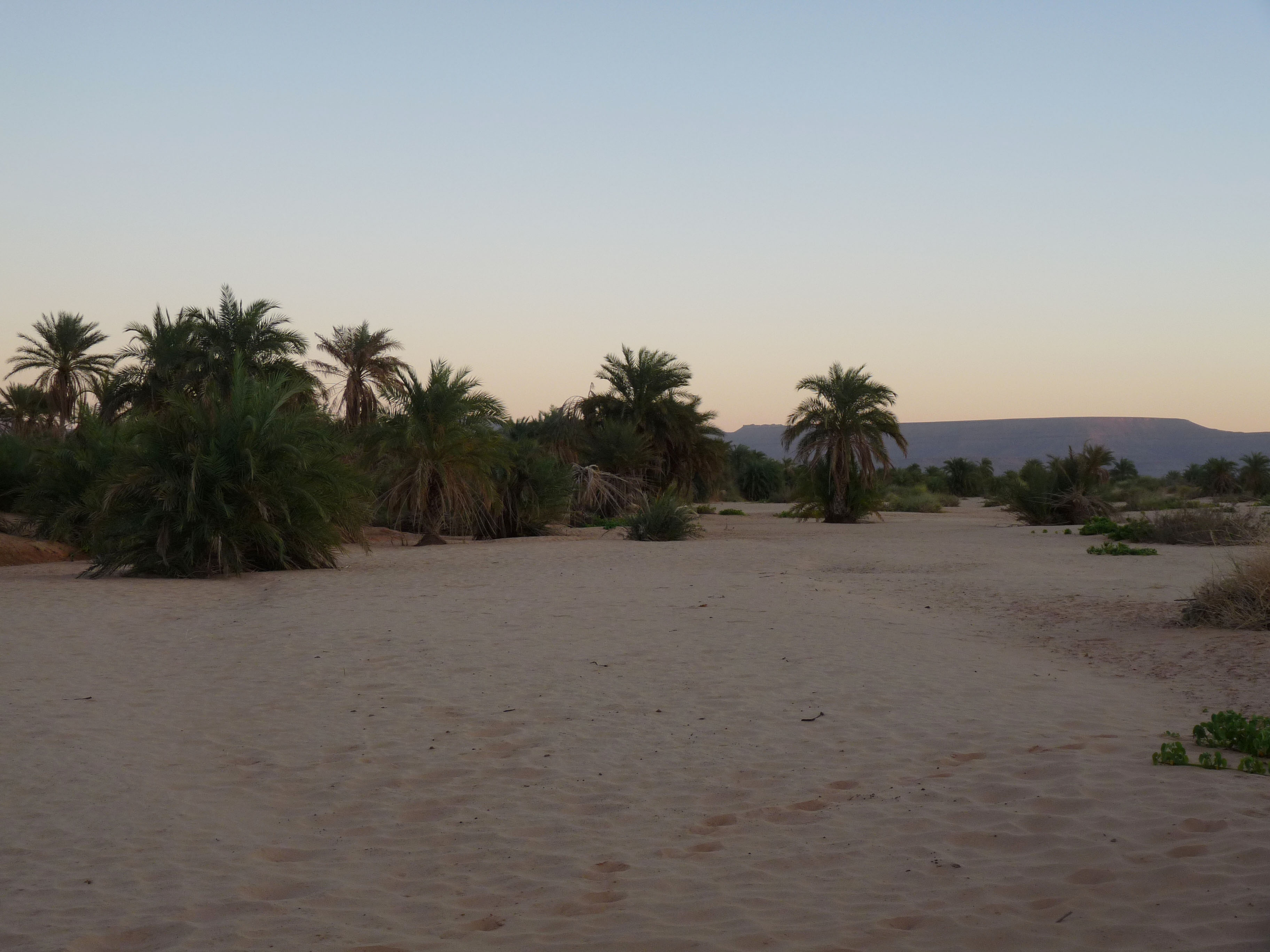 Palmiers en bordure de la batha d'Atar (Mauritanie), au coucher du soleil